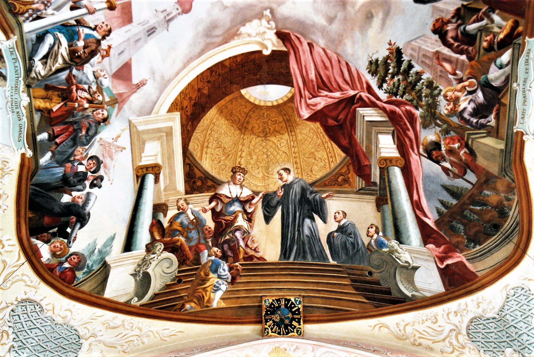 St. Leonhard (Inchenhofen) - Leonhardvita: König Chlodwig bietet Leonhard vergeblich den Bischofsstuhl von Reims an